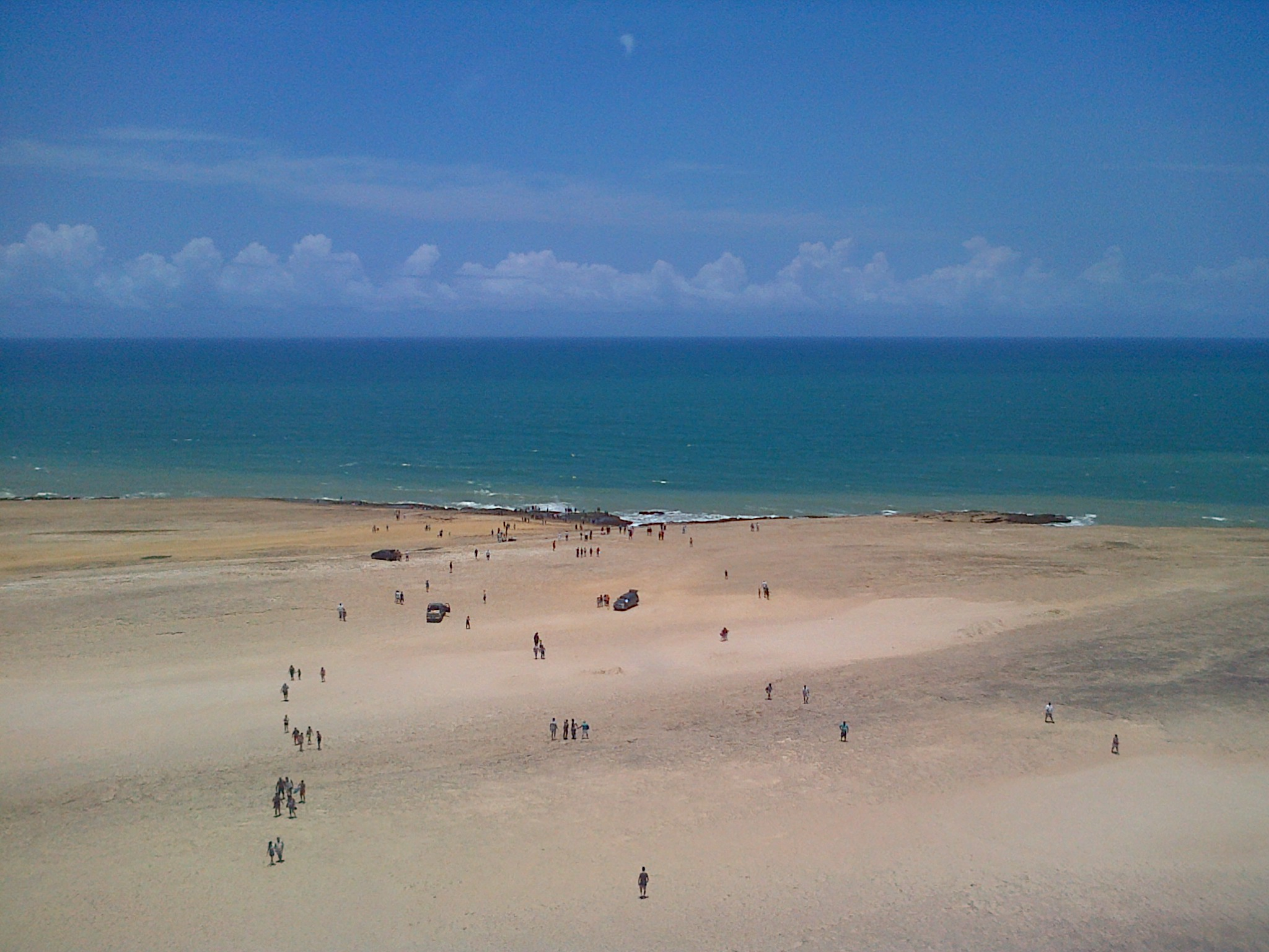 En esta foto podemos apreciar la hermosa vista desde el faro ubicado en el Cabo San Román ubicado en el Edo. Falcón (vista hacia el Mar Caribe).